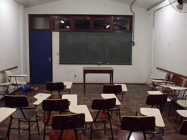 Sala da aula padrão da Faculdade de Biblioteconomia e Comunicação da Ufrgs.